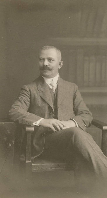 Ion I. Lapedatu